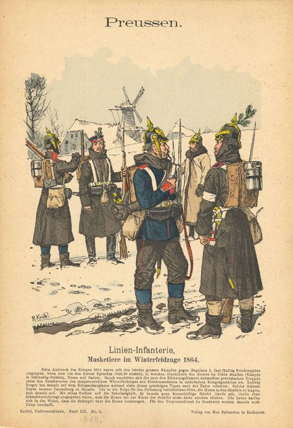 Иллюстрация Рихарда Кнотеля